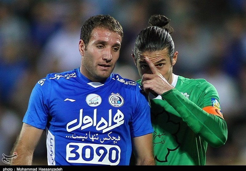 آندرانيک تیموریان و هرایر مکویان